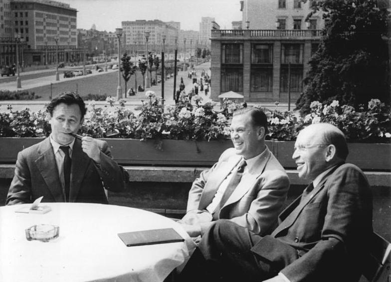 Zentralbild Heilig 6.8.1954. Aussprache zwischen Dr. John und Prof. Dr. Correns. Der ehemalige Präsident des Bonner Verfassungsschutzamtes, Dr. Otto John, suchte am 5.8.1954 den Präsidenten des Nationalrates, Prof. Dr. Correns, auf. Dr. Correns informierte Dr. John auf Wusch ausführlich über die Ziele und Aufgaben der Nationalen Front im Kampf um die friedliche Wiederherstellung der Einheit Deutschlands auf demokratischer Grundlage. In einem längeren offenherzigen Gespräch erklärte Dr. John, dass er seine Kräfte freudig für diese patriotische Aufgabe zur Verfügung stelle. Im Anschluss an die Unterredung besichtigten Dr. John und Prof. Dr. Correns das Hochhaus F-Süd in der Stalinallee. Der Chefarchitekt von Groß-Berlin, Nationalpreisträger Prof. Henselmann, erläuterte die Anlage der Stalinallee und die Wiederaufbaupläne des demokratischen Magistrats für die deutsche Hauptstadt. Dr. John besucht in der Stalinallee unter anderem eine Neubauwohnung, das im Bau befindliche Kinderkaufhaus und die Deutsche Sporthalle. UBz: Auf der Terrasse des Cafes "Warschau" (v.r.n.l.) Prof. Dr. Correns, Dr. John und Professor Henselmann.